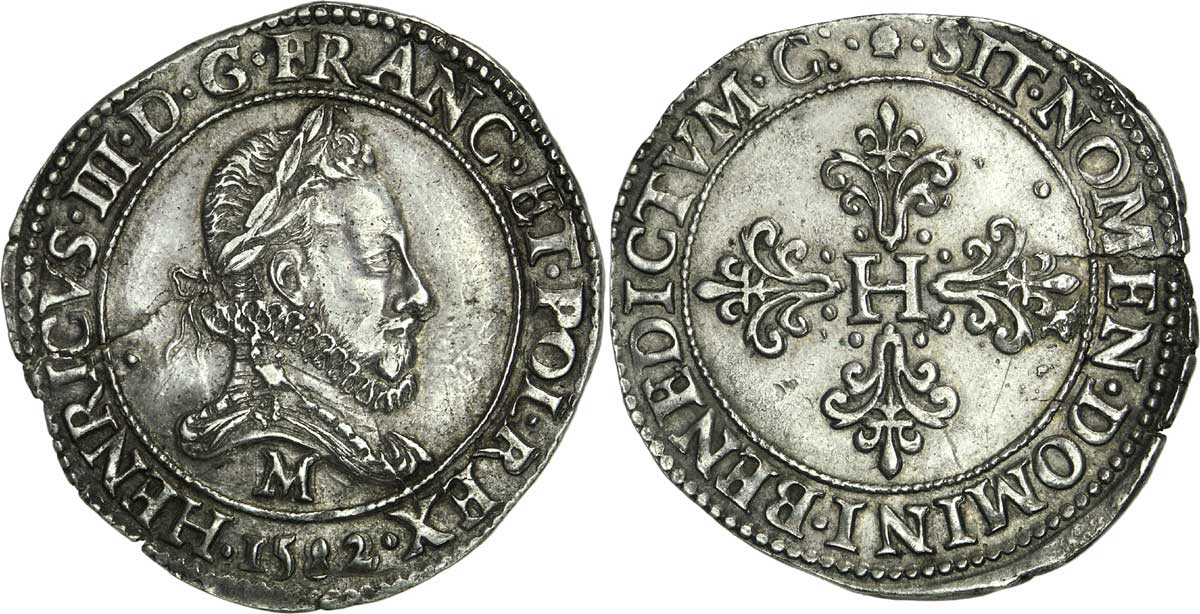 Franc d'Henri III au col fraisé, argent frappé en 1582